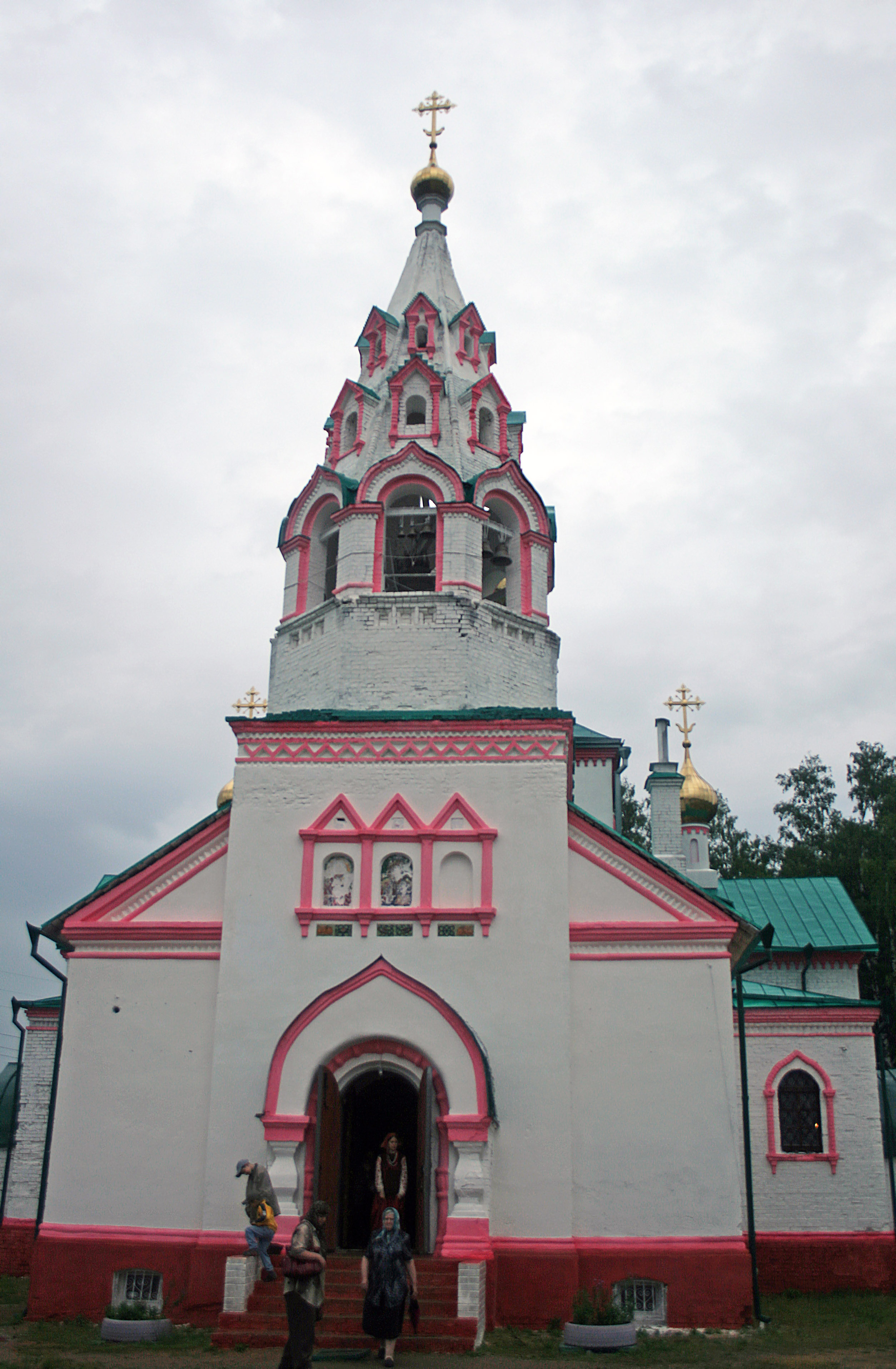 Церковь Троицы Живоначальной в деревне Аверкиево. Павлово-Посадский район Московской области.